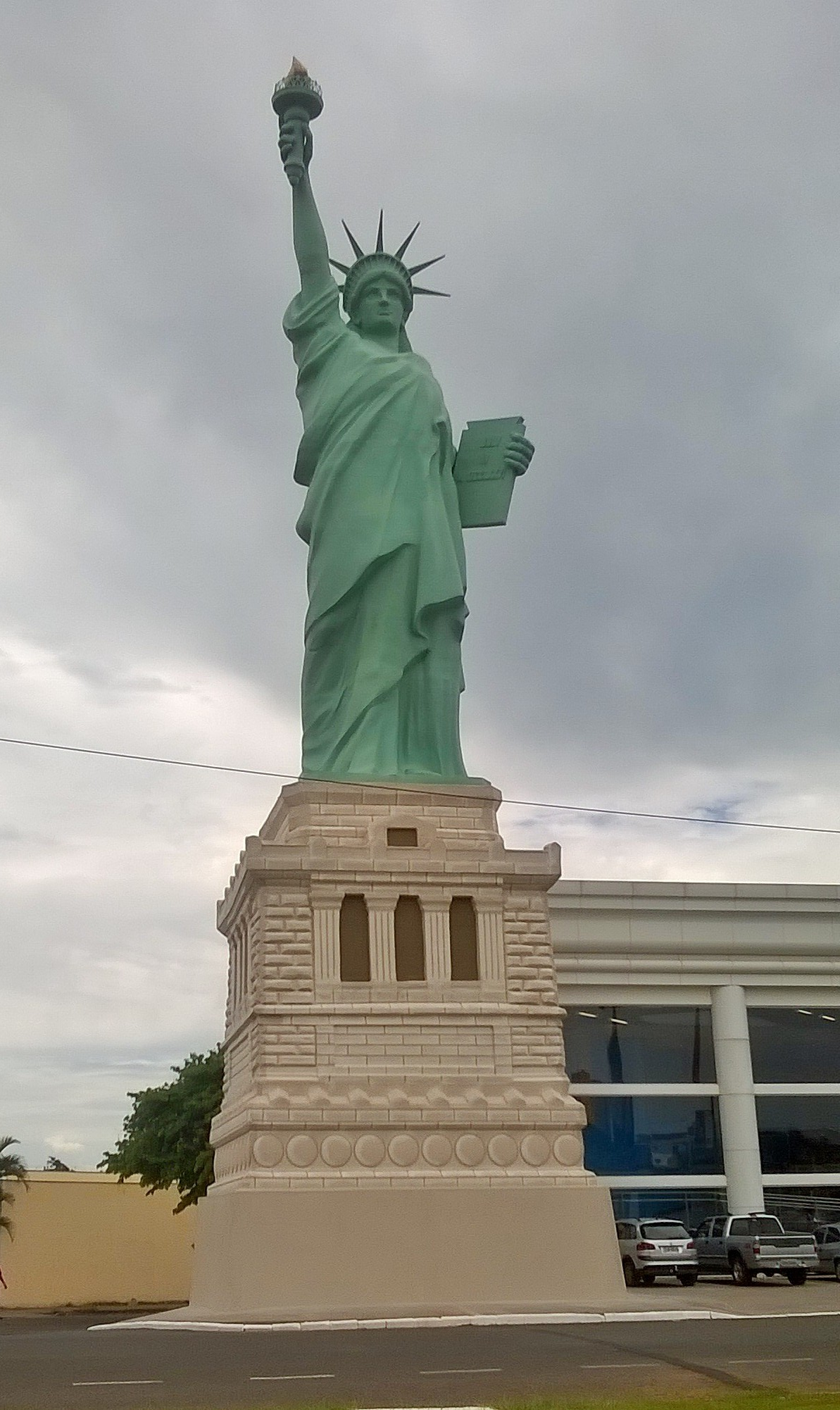 Réplica da Estátua da Liberdade que está instalada na frente da Havan, na Avenida dos Araçás em Araçatuba. Possui cerca de 35 m incluindo a base. Foi instalada no final do ano de 2016